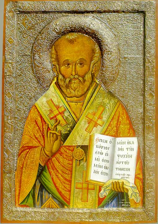 Св. Никола претставен во половина раст. Икона од црквата Св. Никола Геракомија во Охрид, Македонија. Со десната рака благословува, а во левата држи голема отворена книга. Од стариот живопис останала непресликана само главата на светителот.